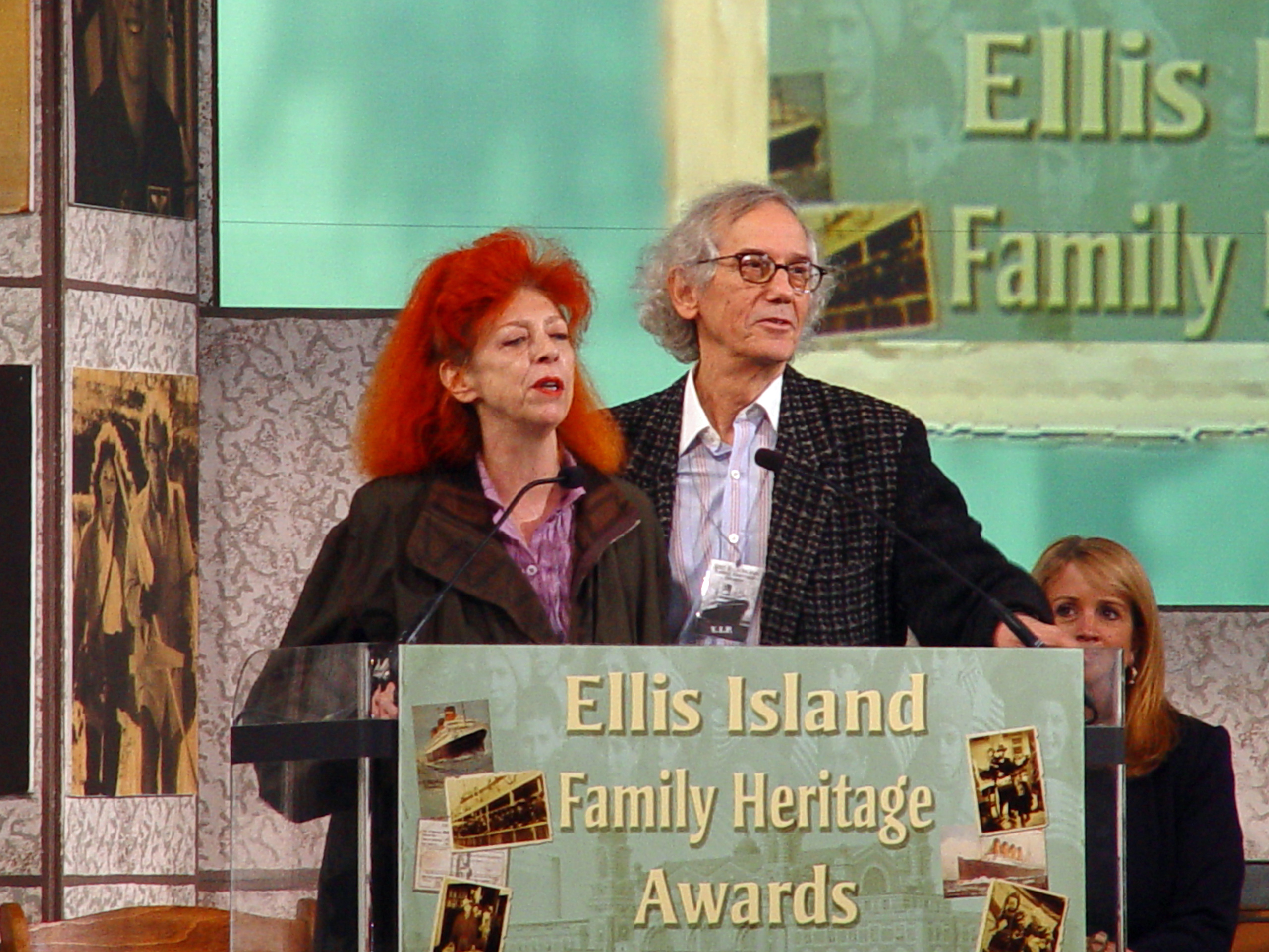 Fotografiert von Martin Dürrschnabel Christo und Jeane Claude beim Ellis Island Heritage Award